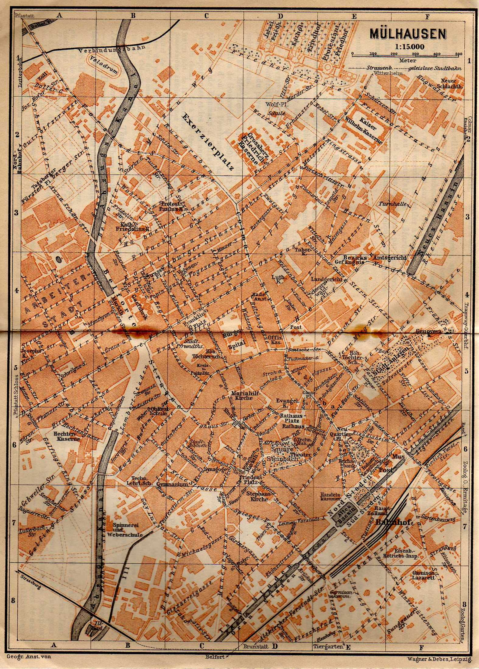 Plan au 1/15.000 de Mülhausen (Mulhouse, Alsace) à l'époque de l'Alsace-Lorraine